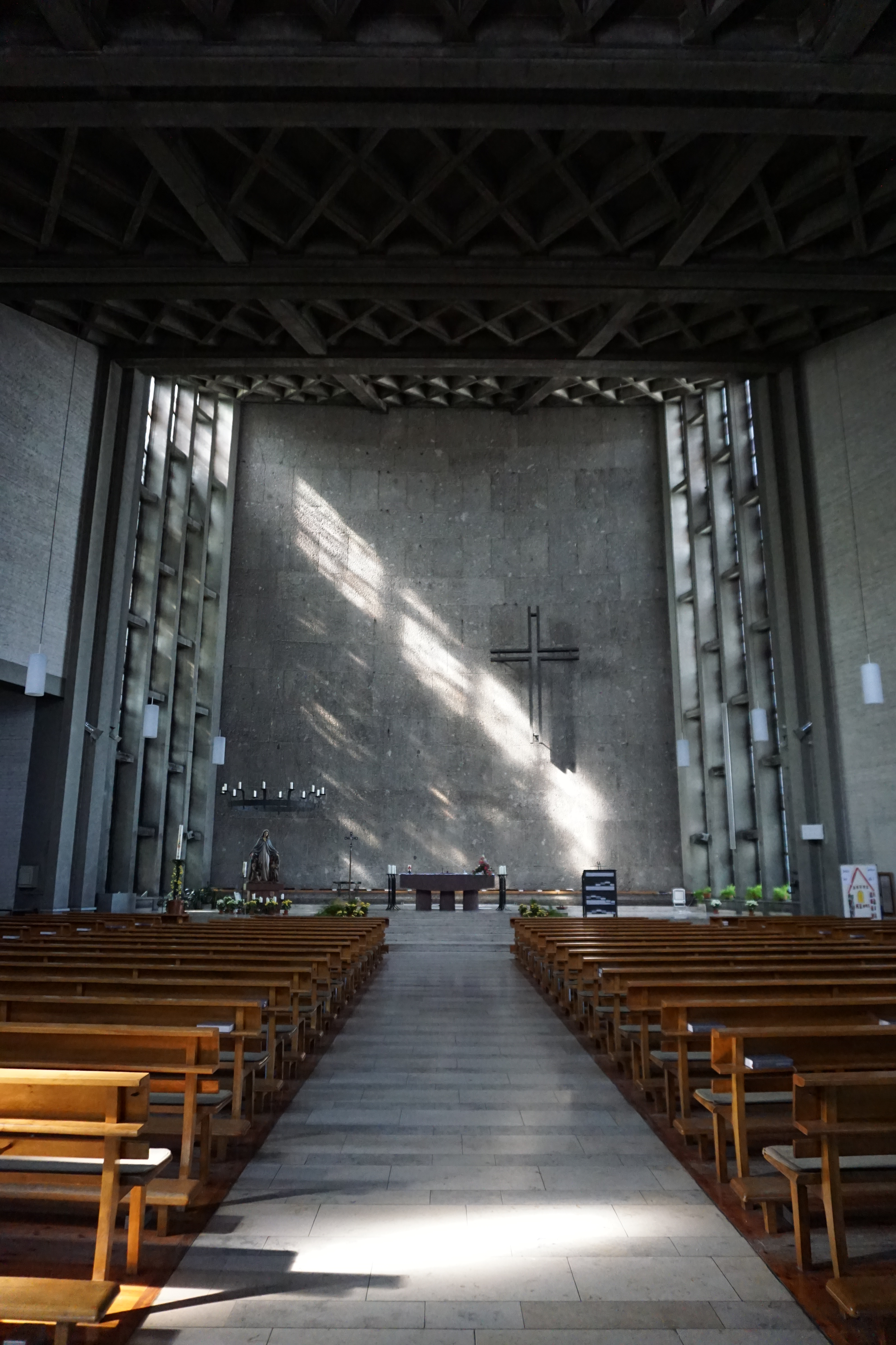 St. Thomas Morus ist ein modernes Kirchengebäude im Münchner Stadtteil Sendling-Westpark. Es ist als Baudenkmal in die Denkmalliste eingetragen.